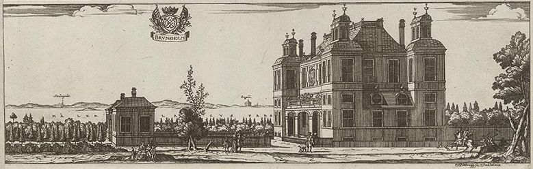 Brunsholm